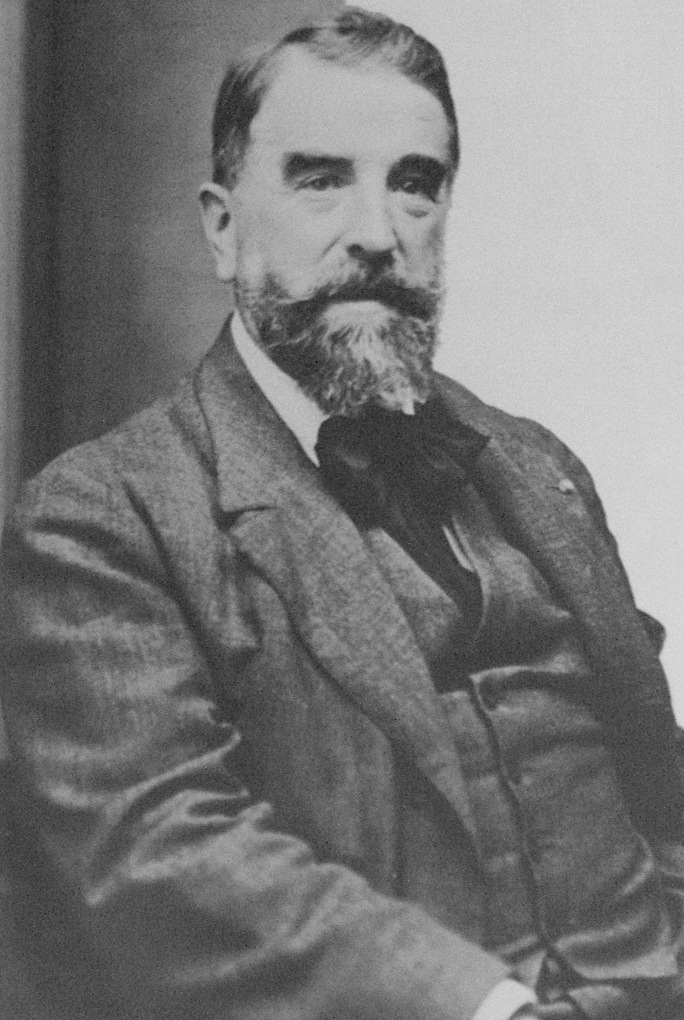 Retrat de Miquel Blay i Fàbregas (Olot, La Garrotxa, 1866 - Madrid 1936) fou un escultor català de l'escola d'Olot